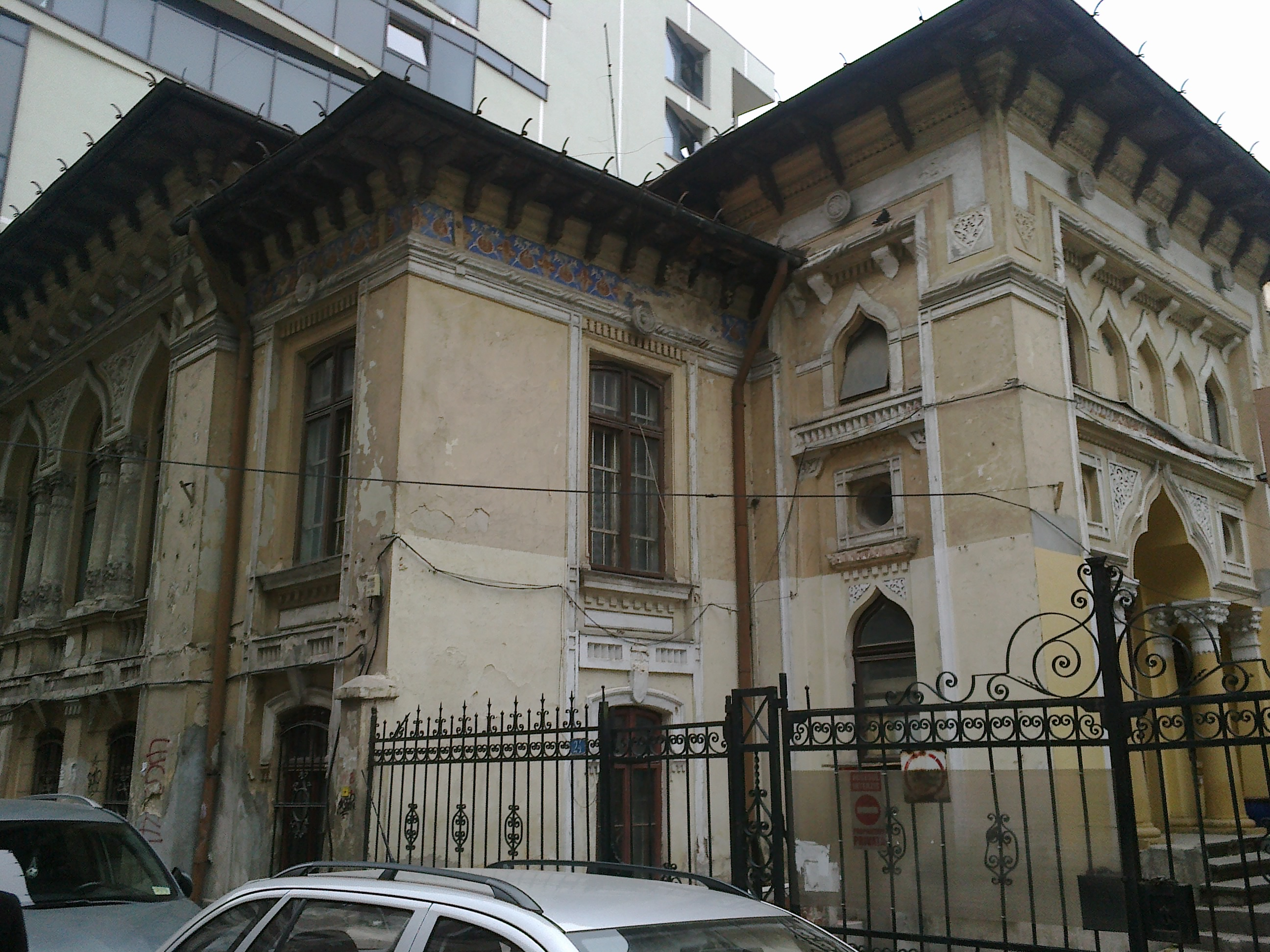 Casă, imobil de patrimoniu